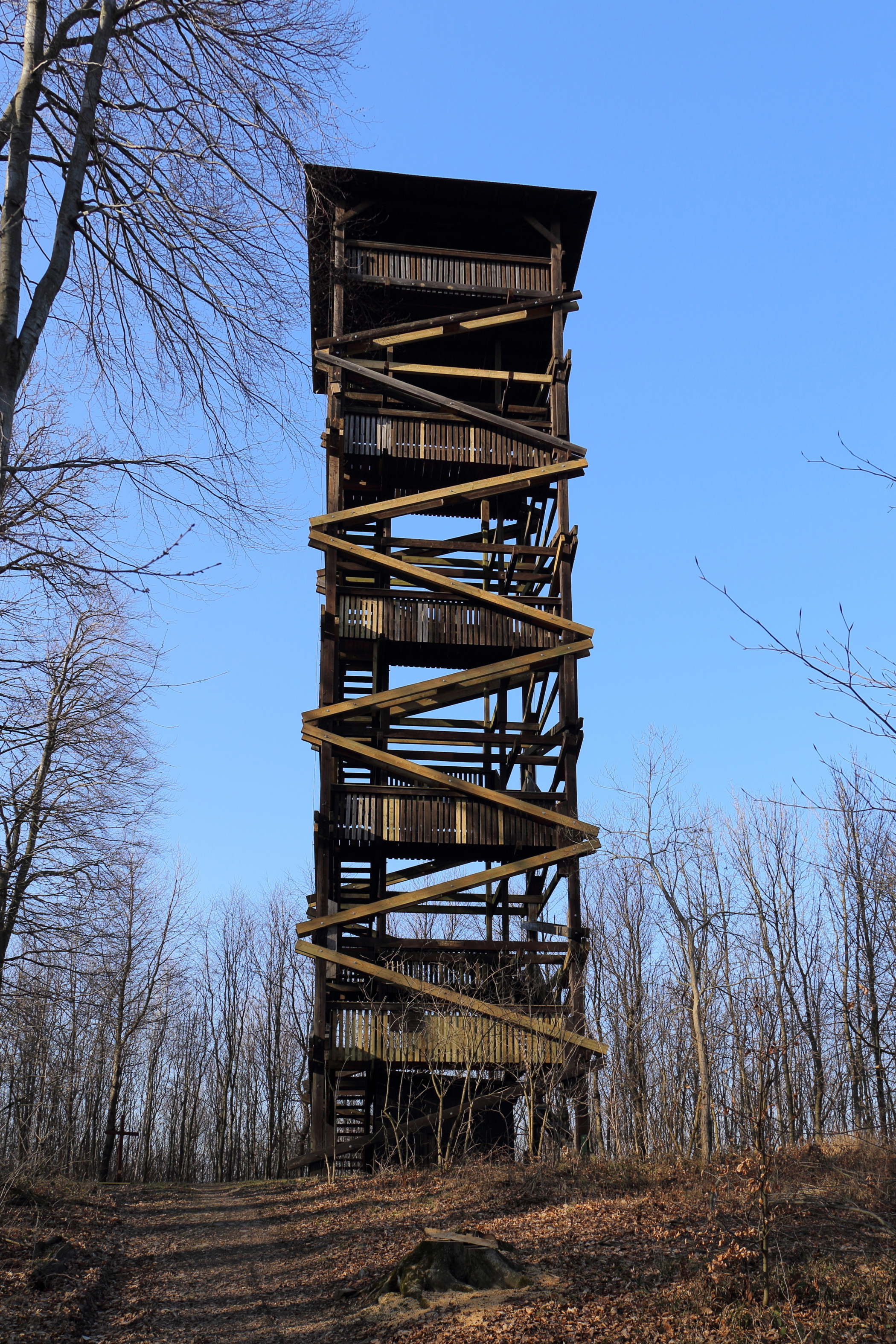 Die Rudolfswarte auf der 475 Meter hohen Rudolfshöhe im Wienerwald bei Purkersdorf. Die 28,5 Meter hohe Warte wurde um 1977 vom Naturparkverein "Sandstein-Wienerwald" errichtet, 1999 generalsaniert und 2009 saniert.